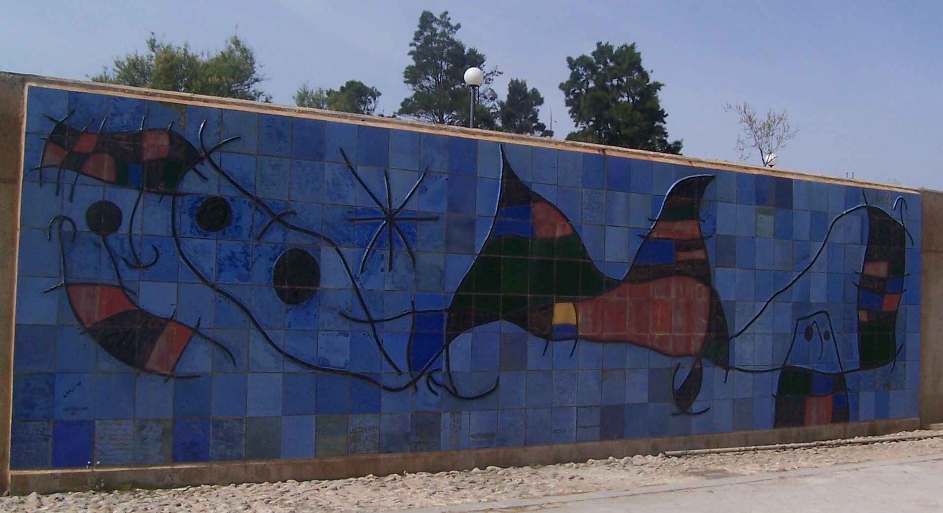 Wandbild von Joan Miró, Palma de Mallorca, 1983